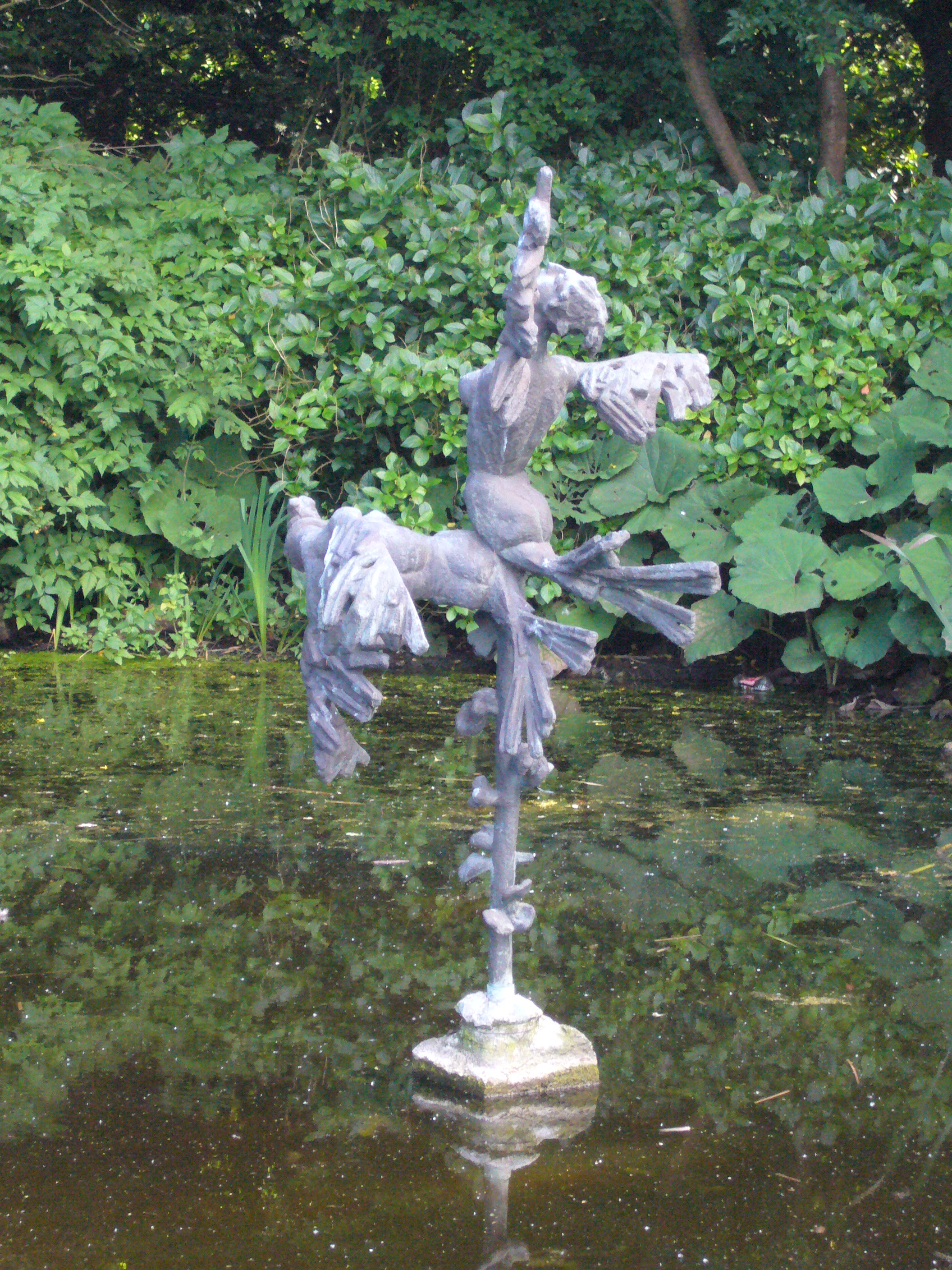 Westbroekpark, De Sirenen, bronzen beeld van Everdine Schuurman-Henny Sculpture in The Hague/The Netherlands